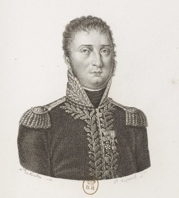 Baptiste Pierre Bisson (1767-1811), général de division et comte de l'Empire. Gros buveur à la réputation de gourmet, il s'illustre particulièrement à la bataille de Friedland en 1807.